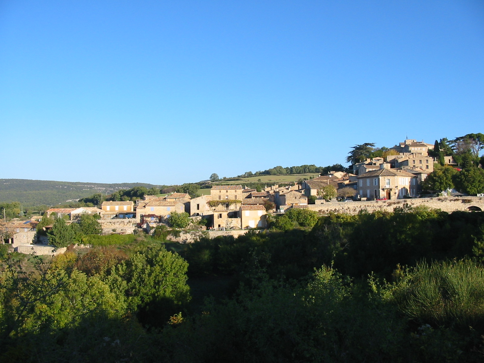 Village de Murs